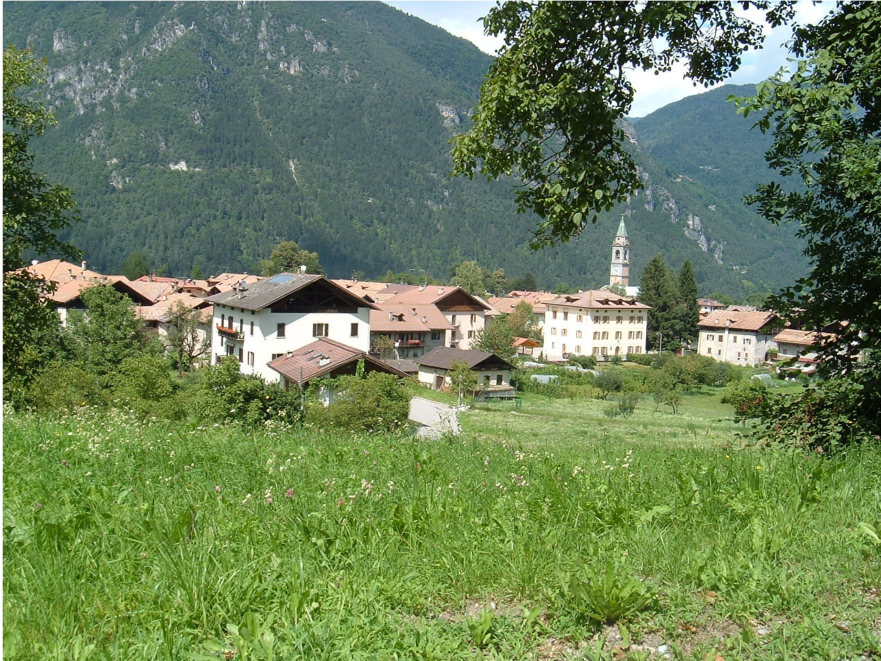 Foto del comune di Bolbeno